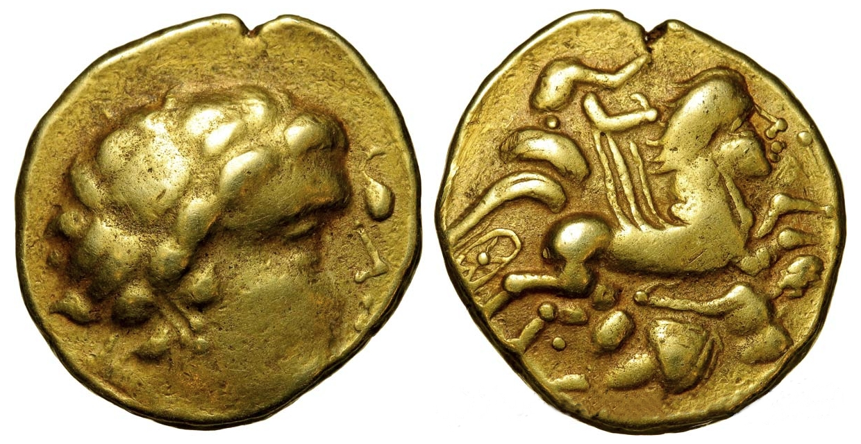 Statère en or des Cénomans ou Aulerques-Cénomans (région du Mans, France). Avers : Tête à droite, les cheveux coiffés en mèches tirées en arrière tombant sur le cou. Revers : Cheval androcéphale galopant à droite, conduit par un aurige tenant devant lui un étendard (?) hors-flan, derrière, une roue, sous le cheval, personnage couché à droite, tenant deux objets ovoïdes. Diamètre 20,5 mm, poids 7,62 g. Ce statère provient de la découverte du dépôt des Sablons (Le Mans), N° 115, vente Weil 2001, n°132 (cf: Trésors monétaires XXIV, BnF, 2011.